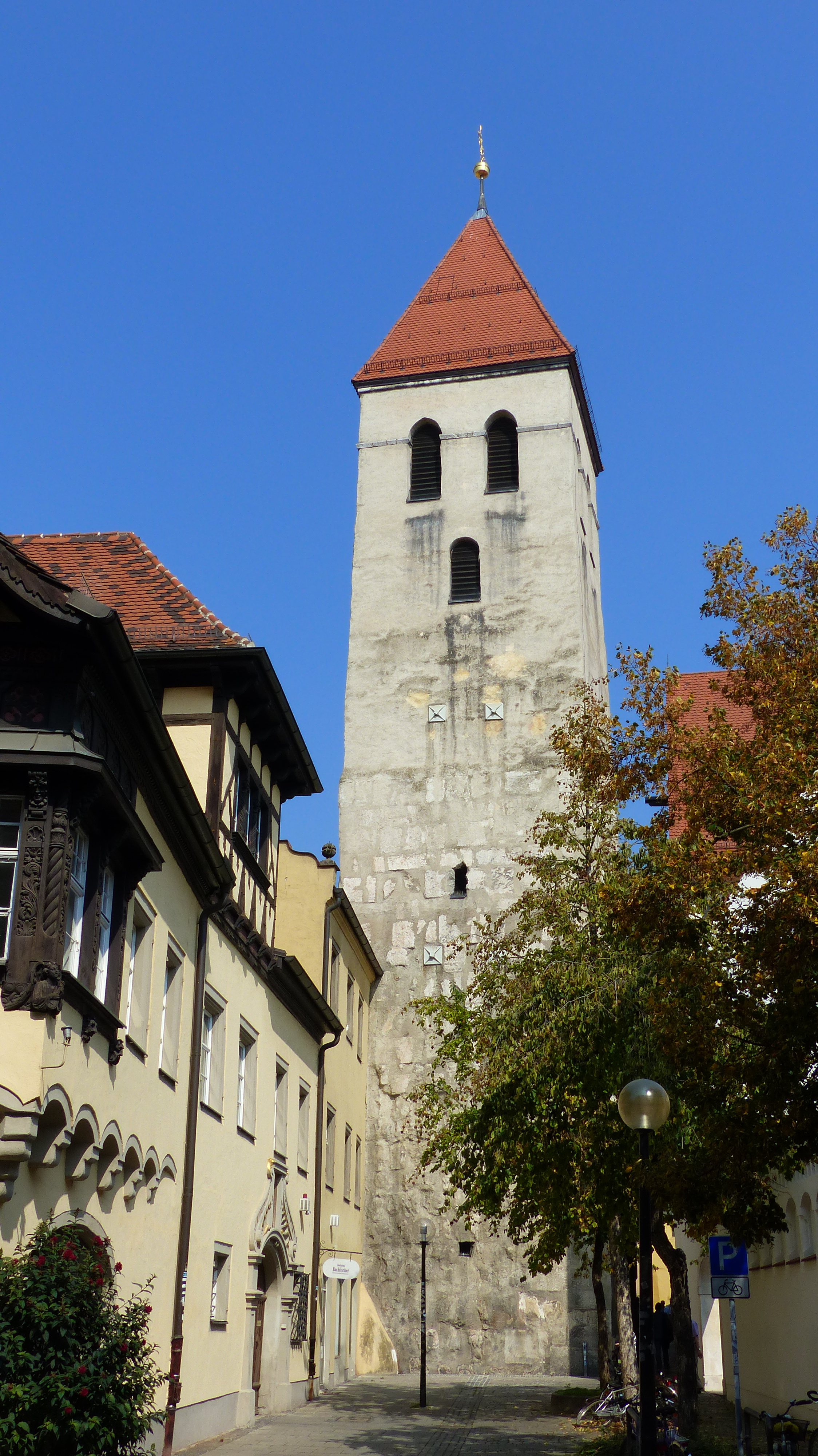 Turm der Alten Kapelle in RegensburgThis is a photograph of an architectural monument.